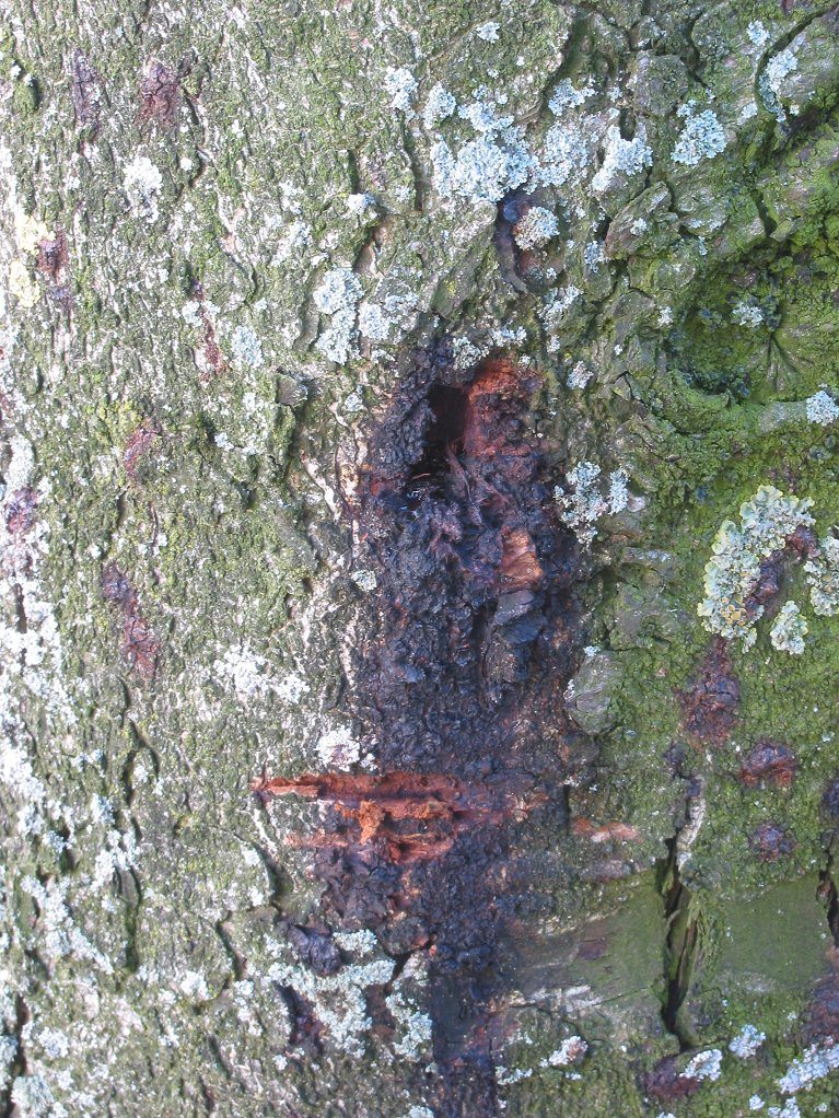 zelfgemaakte foto van nog onbekende ziekte op Paardekastanje; half november